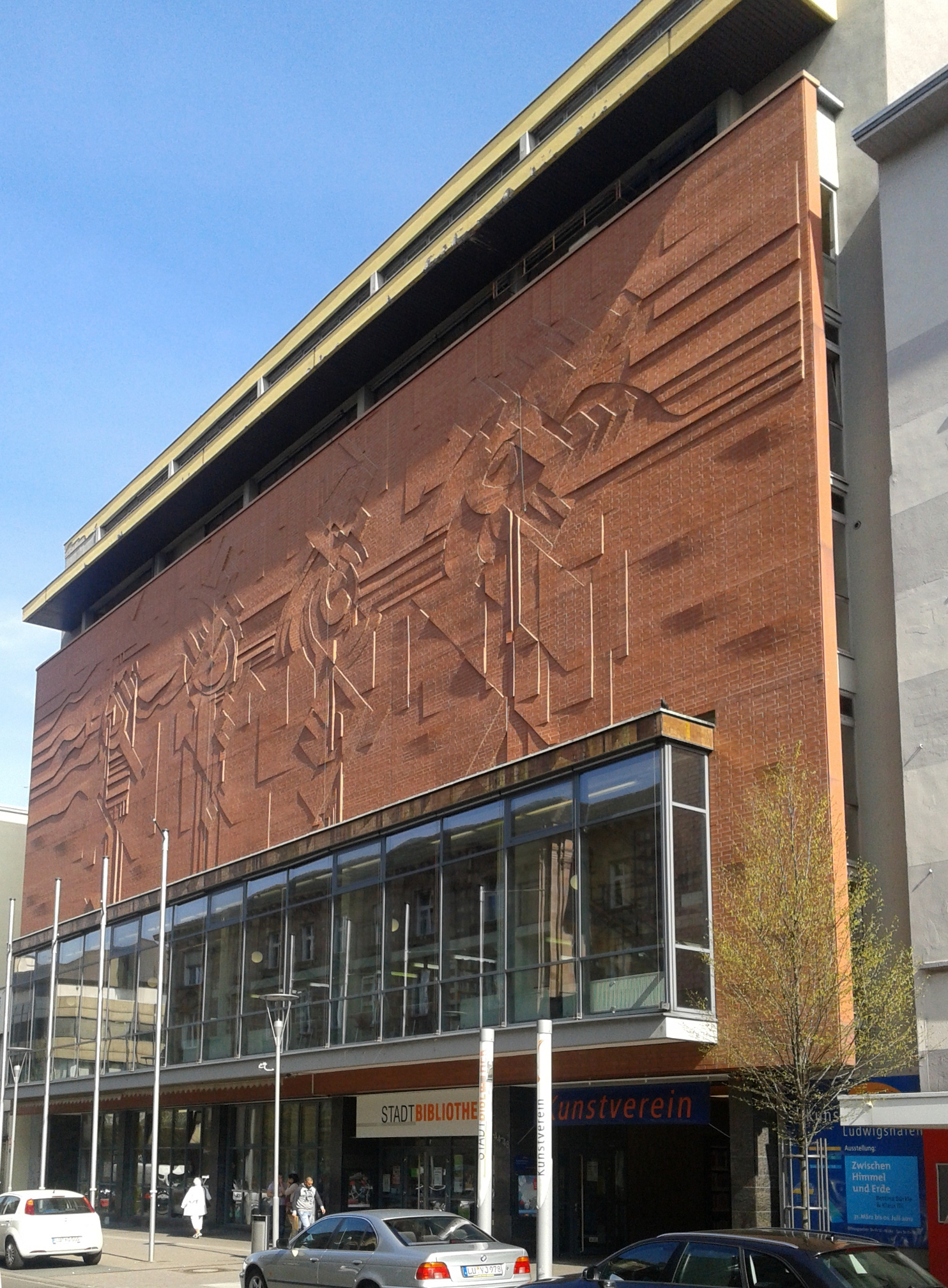 Stadtbibliothek und Kunstverein in Ludwigshafen